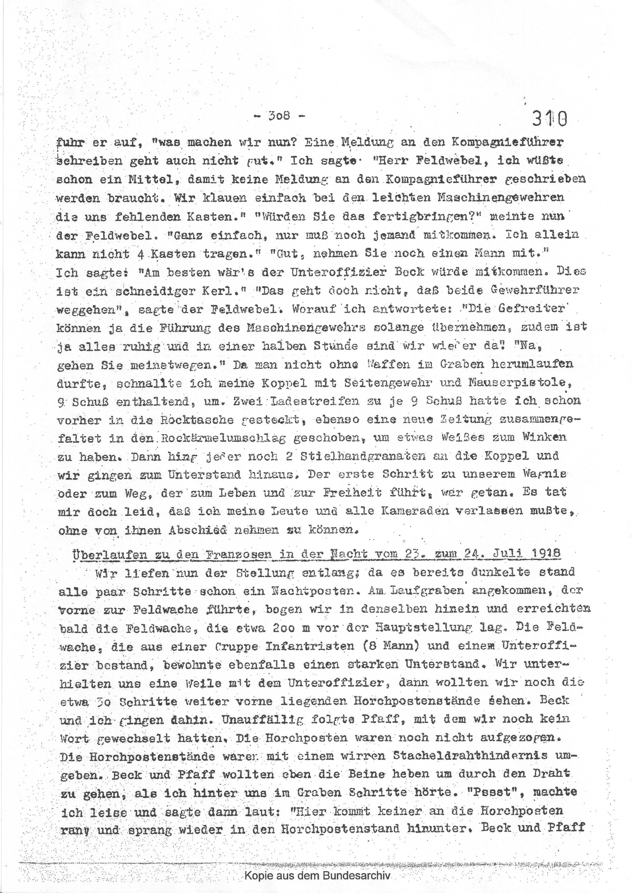 letzter Teil der Kriegerinnerungen von Richert.